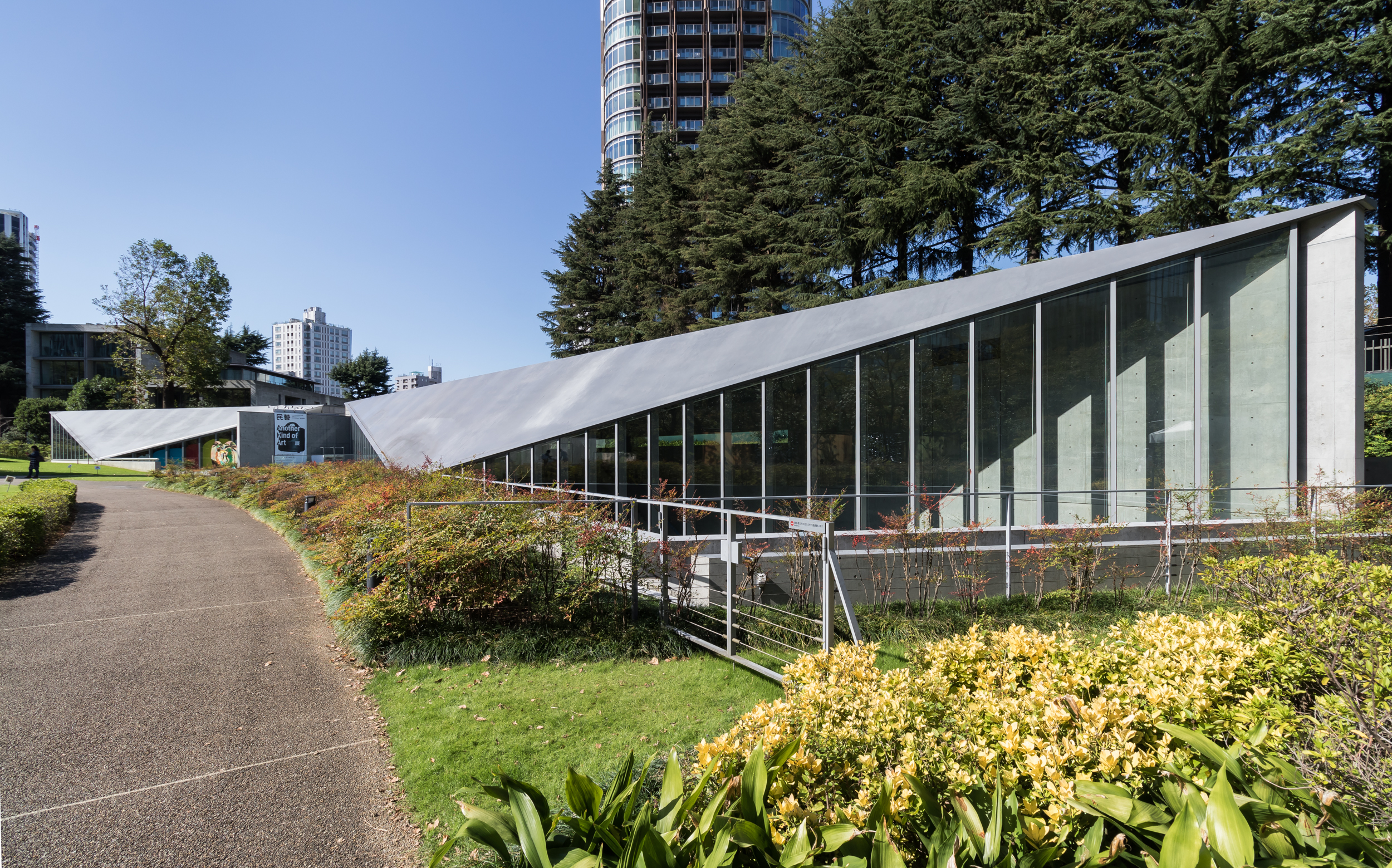 21_21 DESIGN SIGHT, 東京都港区赤坂、安藤忠雄+日建設計、2007年。